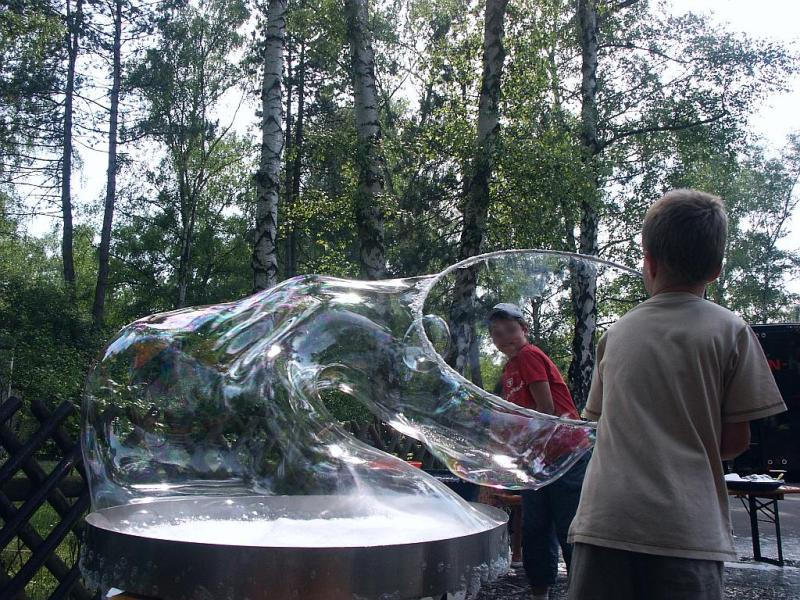 Big soap-bubble